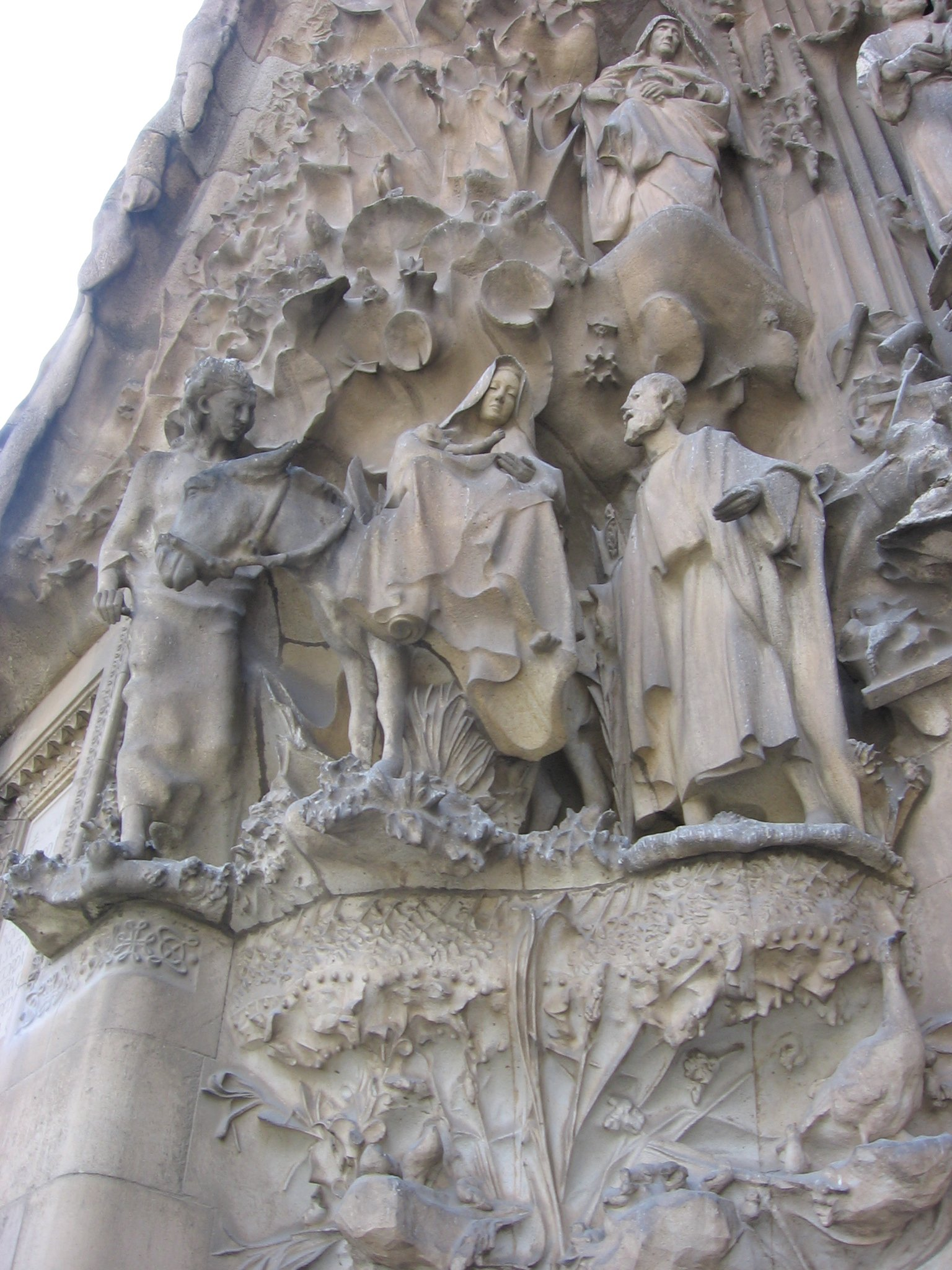 Huida a Egipto, Fachada del Nacimiento, Sagrada familia, Barcelona, Spain